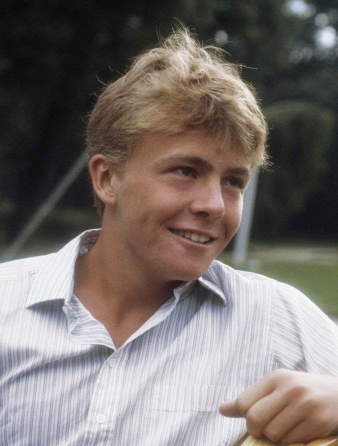 Foto uurtje Koninklijke Familie op Huis ten Bosch ; Prins Johan Friso